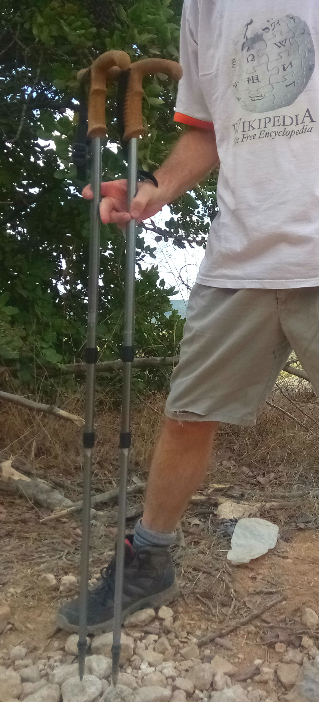 מוטות הליכה עם ידית שעם בצורת T